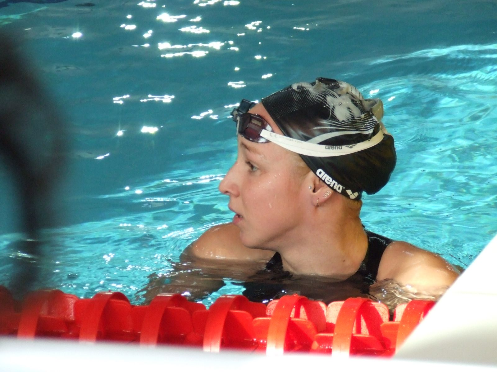 Verrasztó Evelyn úszó Százhalombattán a rövidpályás OB-n